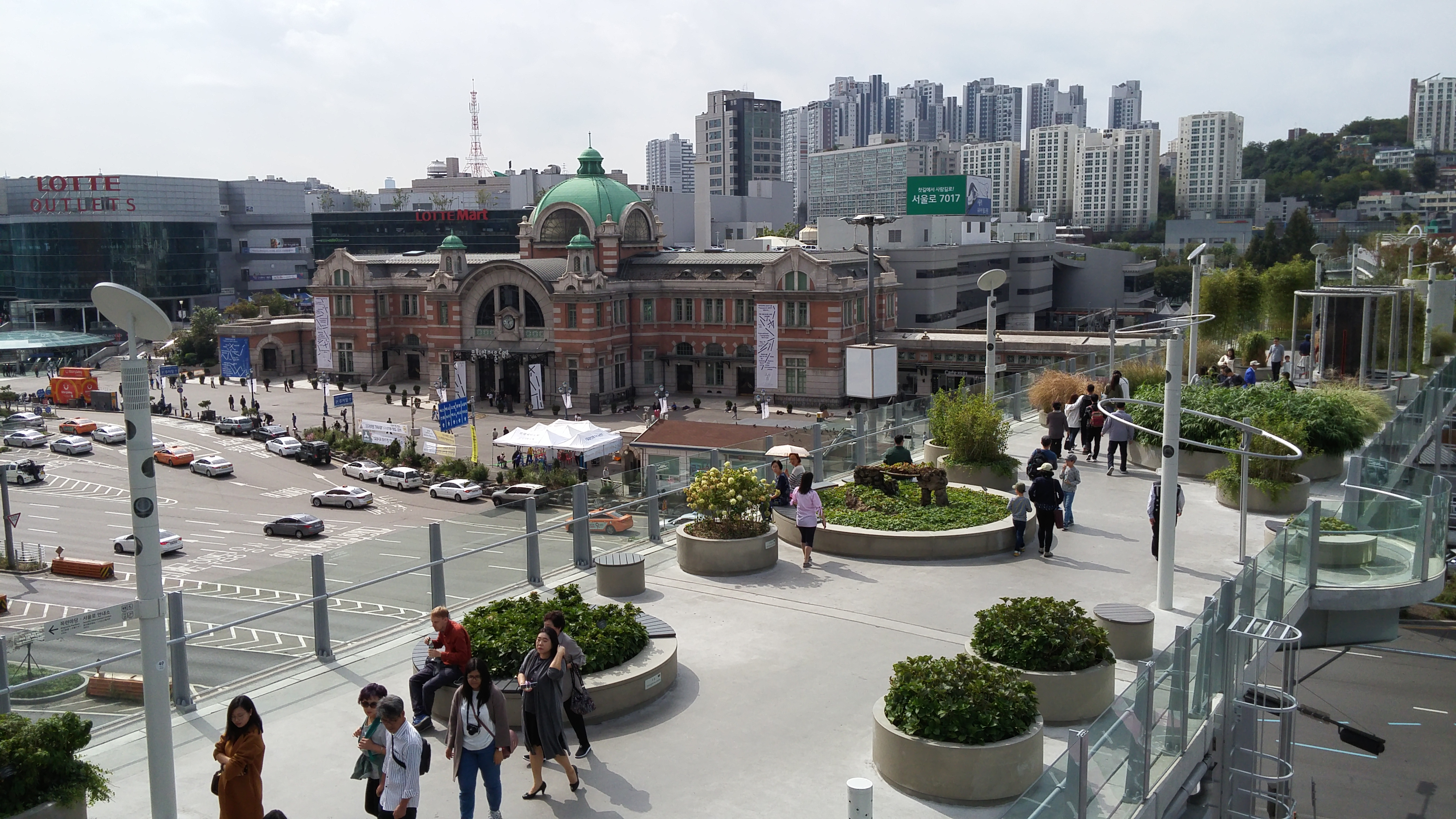 Seoullo 7017, ehemaliger Highway nahe Seoul Station.